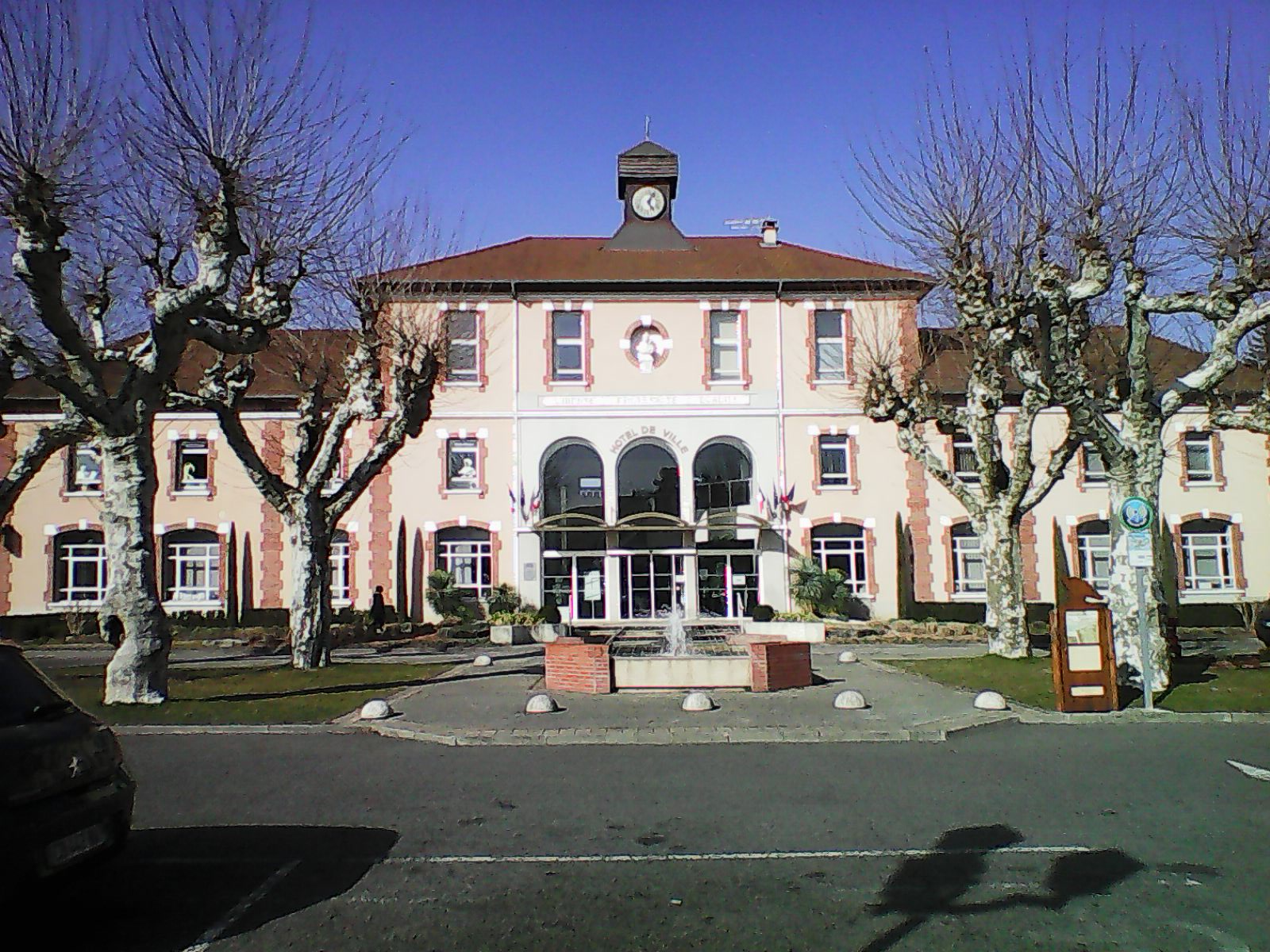 Mairie de de St Étienne de St Geoirs en février 2019